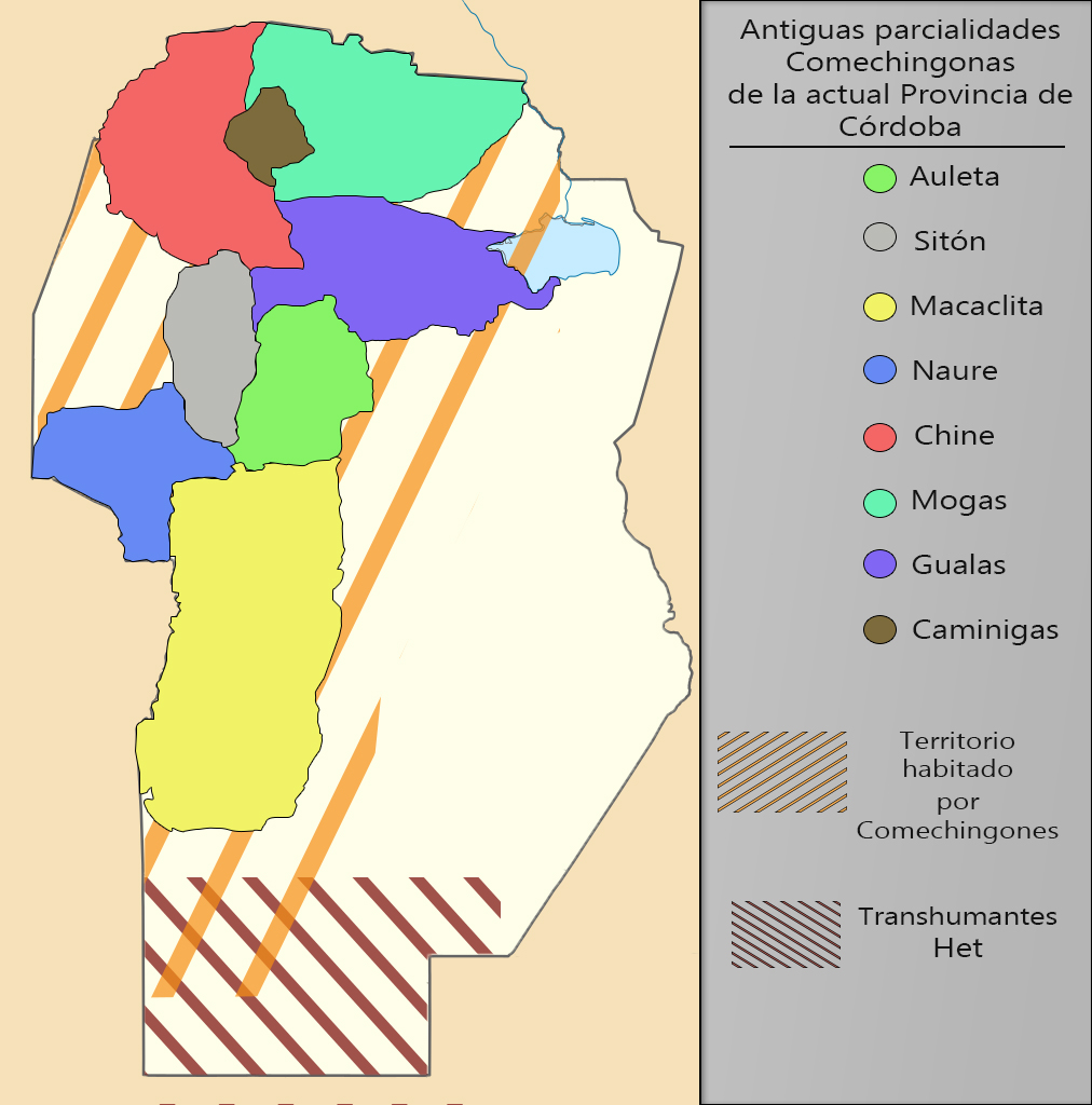 Mapa con las Parcialidades y principales subparcialidades de la etnia comechingona(henia) en la Provincia de Córdoba